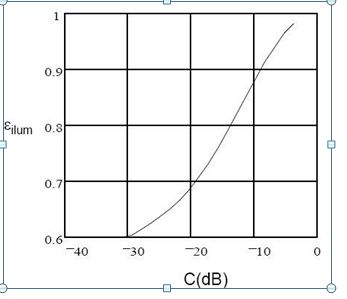 Gráfica Eficiencia de Iluminación